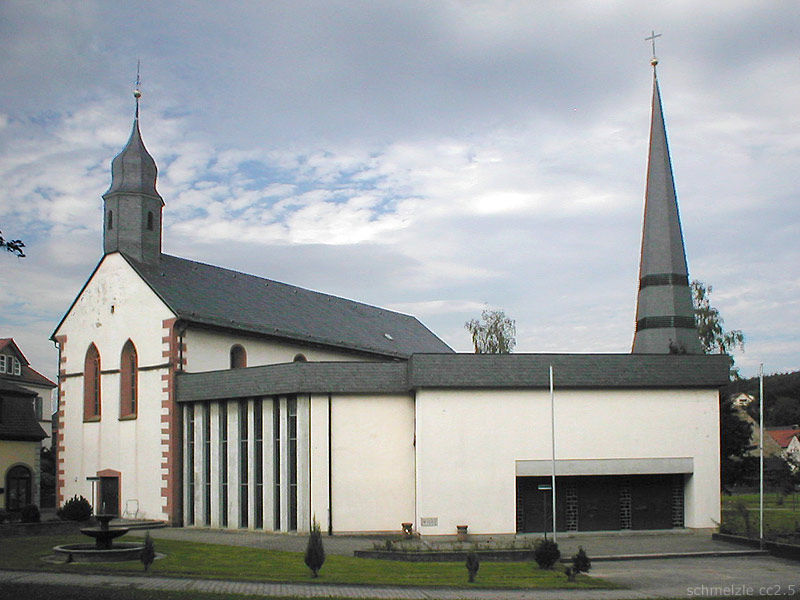 Pfarrkirche St. Michael in Billigheim (Baden)